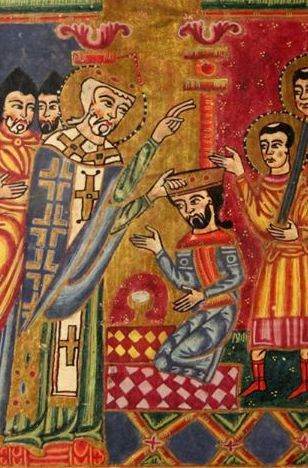 Ստեփանոս Դ-ն օծում է Սմբատ Արծրունուն